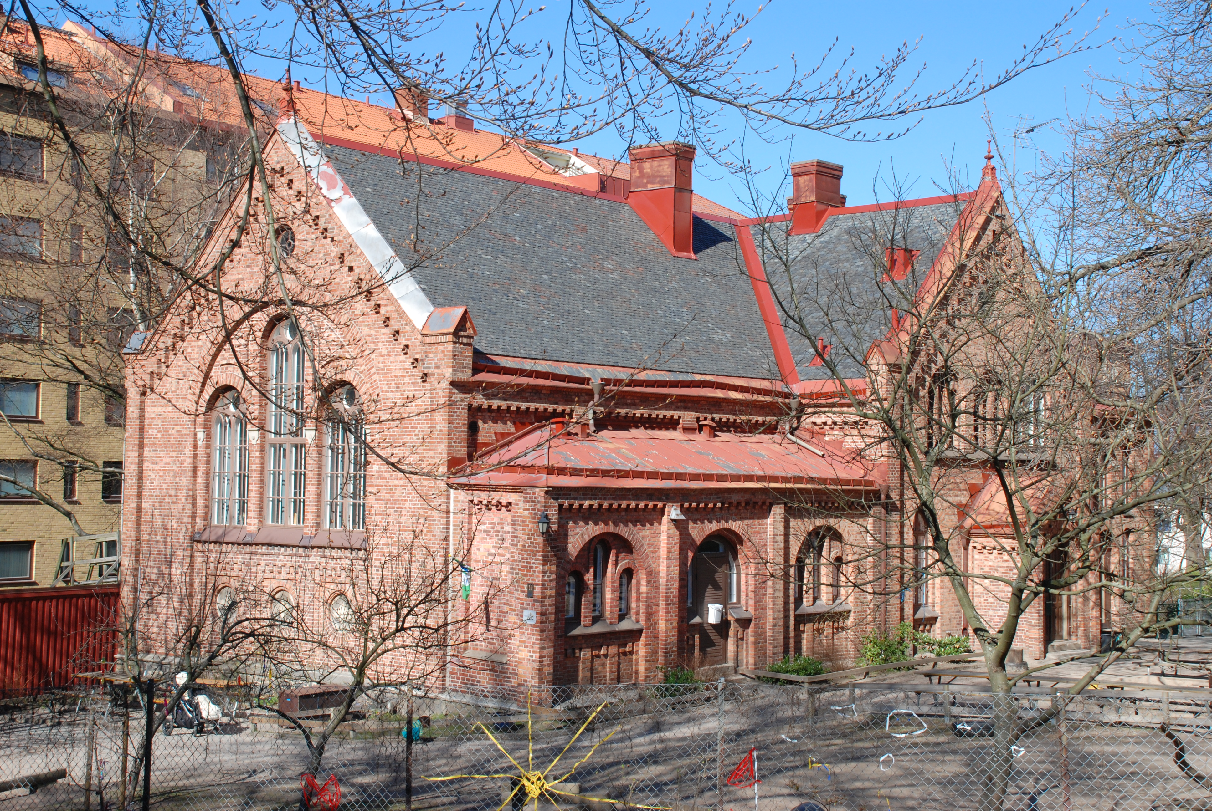 Annedals Småbarnsskola vid Folke Bernadottes Gata 4 i stadsdelen Vasastaden i Göteborg.